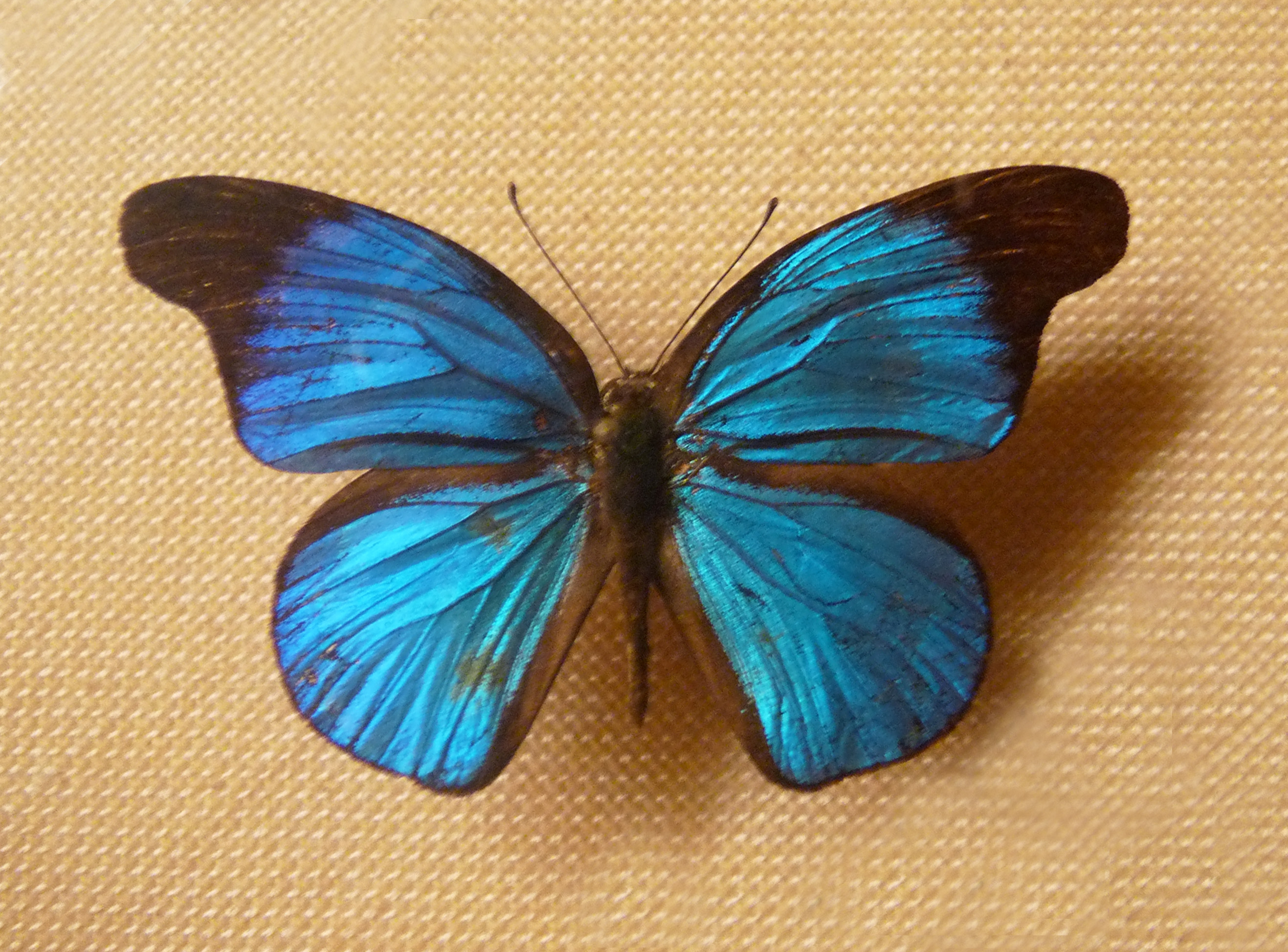 Epitola posthumus (Fabricius, 1791)(Centrafrique) au Musée zoologique de Strasbourg